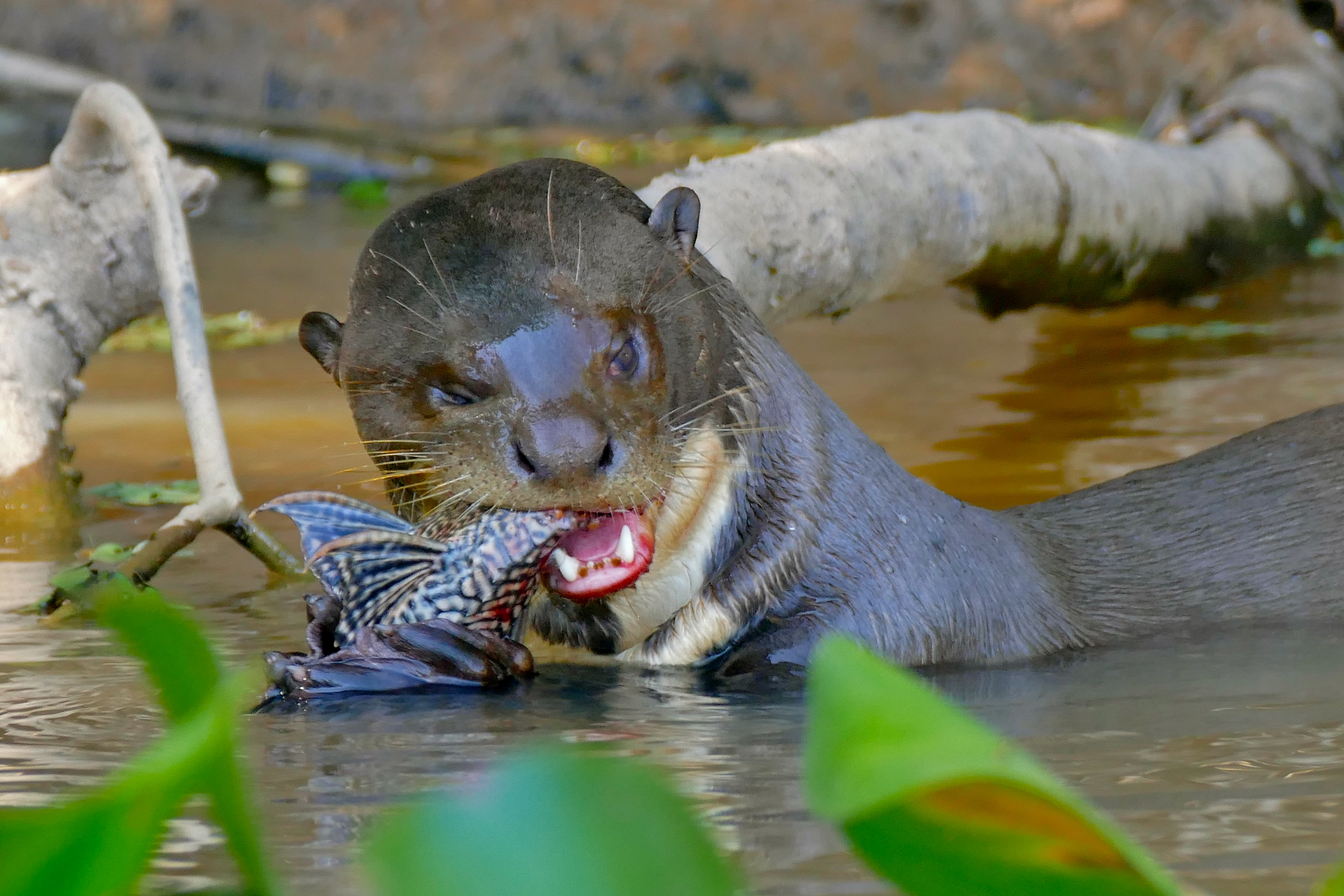 Rio São Lourenço, Porto Jofre, Pantanal, Poconé, Mato Grosso, BRAZIL